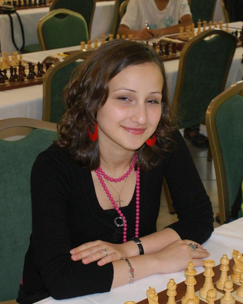 WGM Sopiko Guramishvili, XXVII Obert Internacional d'Andorra. Hotel St Gothard Erts La Massana Patrocina Hble. Comú de La Massana del 18/07/2009 al 26/07/2009.